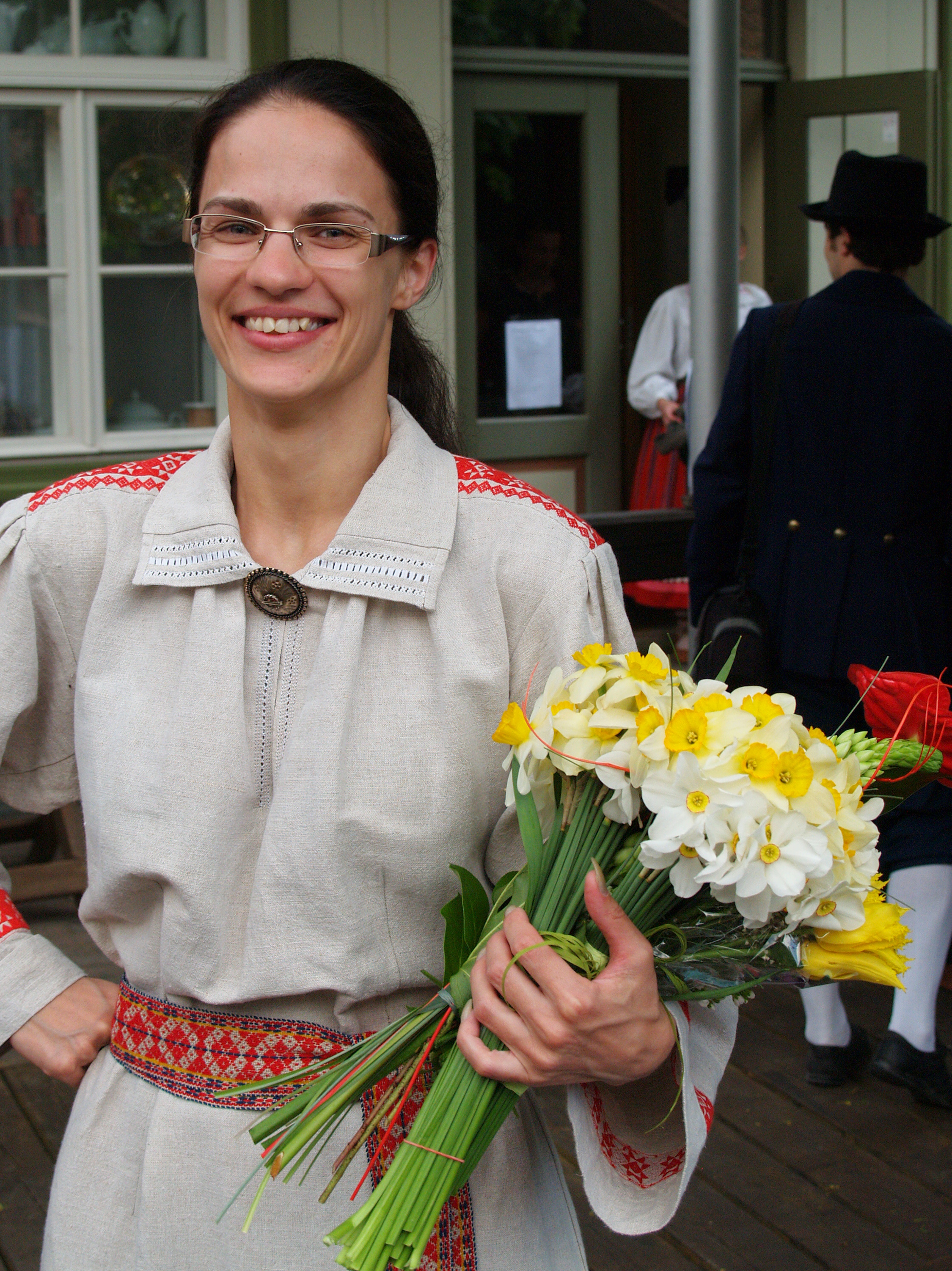 Tartu Ülikooli Rahvakunstiansambli kevadkontsert Antoniuse õues. Aveli Asber.